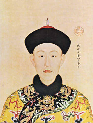 The young Qianlong Emperor